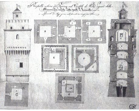 Spaccato del torrione del castello dei Pico, andato distrutto a seguito dello scoppio della polveriera causato da un fulmine caduto il giorno 11 giugno 1714